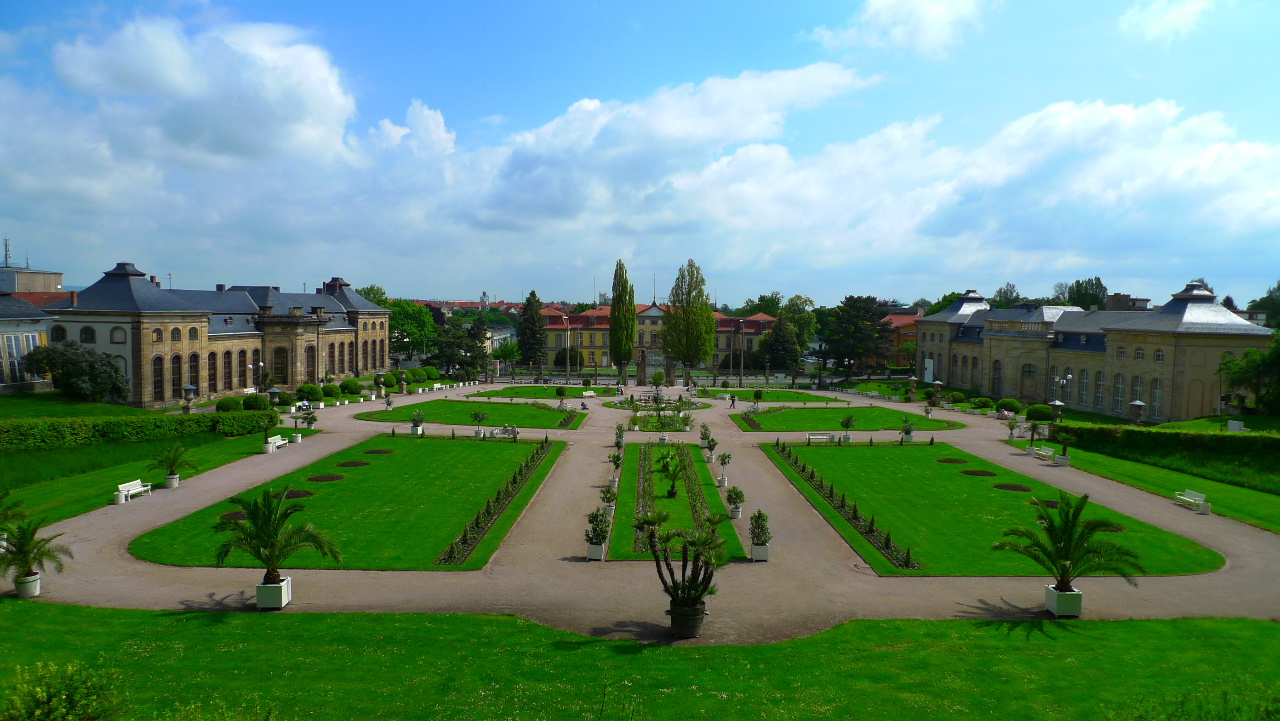 Gotha - Orangerie